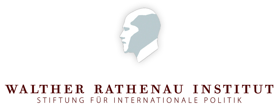 Die Datei stellt das Logo des Walther Rathenau Instituts, Stiftung für internationale Politik, dar.